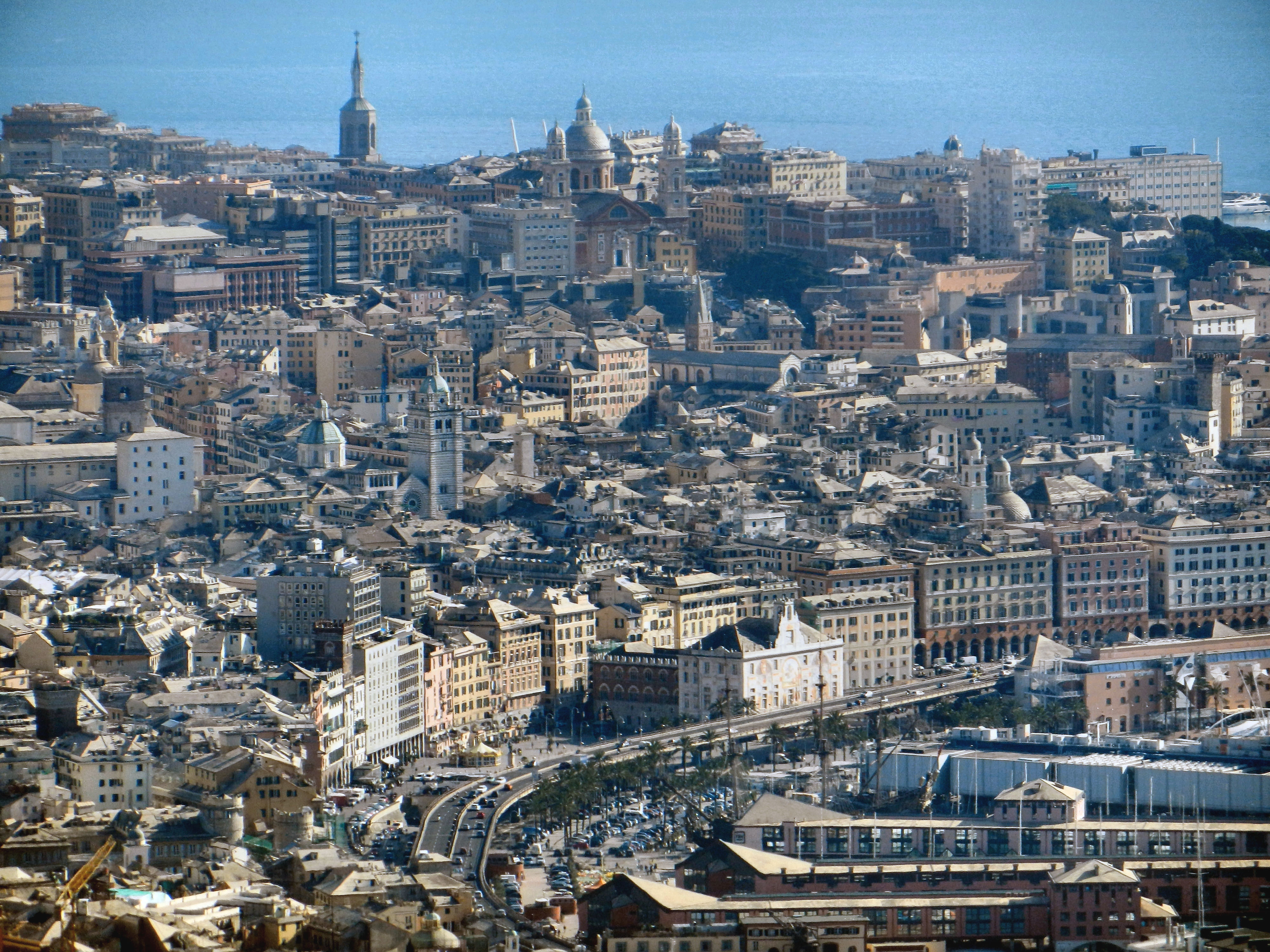 Genova, panoramica sul centro storico da Granarolo